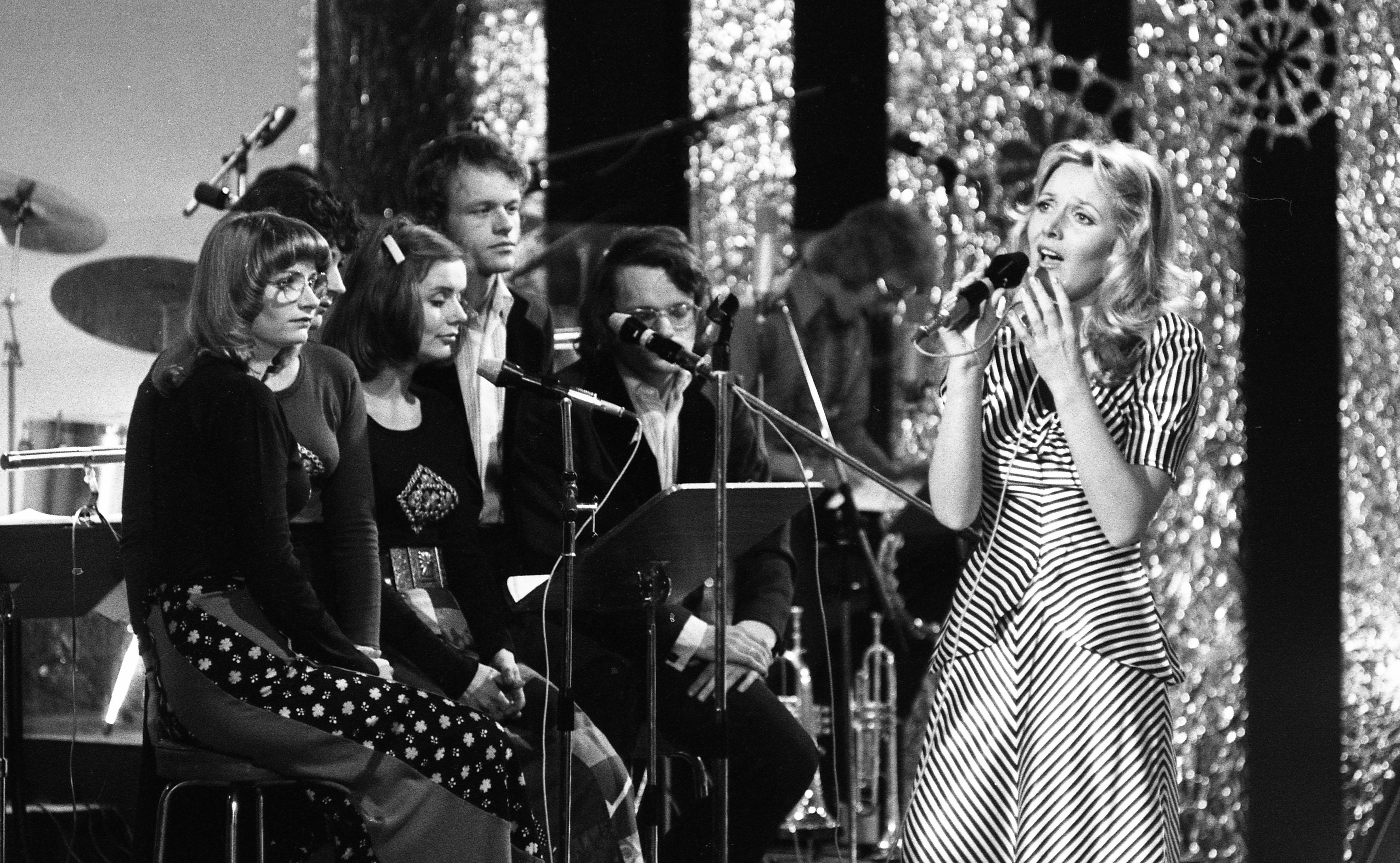 Melodi Grand Prix, norsk finale i TV-studio 1 NRK, 1974. Fra generalprøven. Foto: Petter R. Iversen. Arkivref: PA-0797_U_7631_014_024